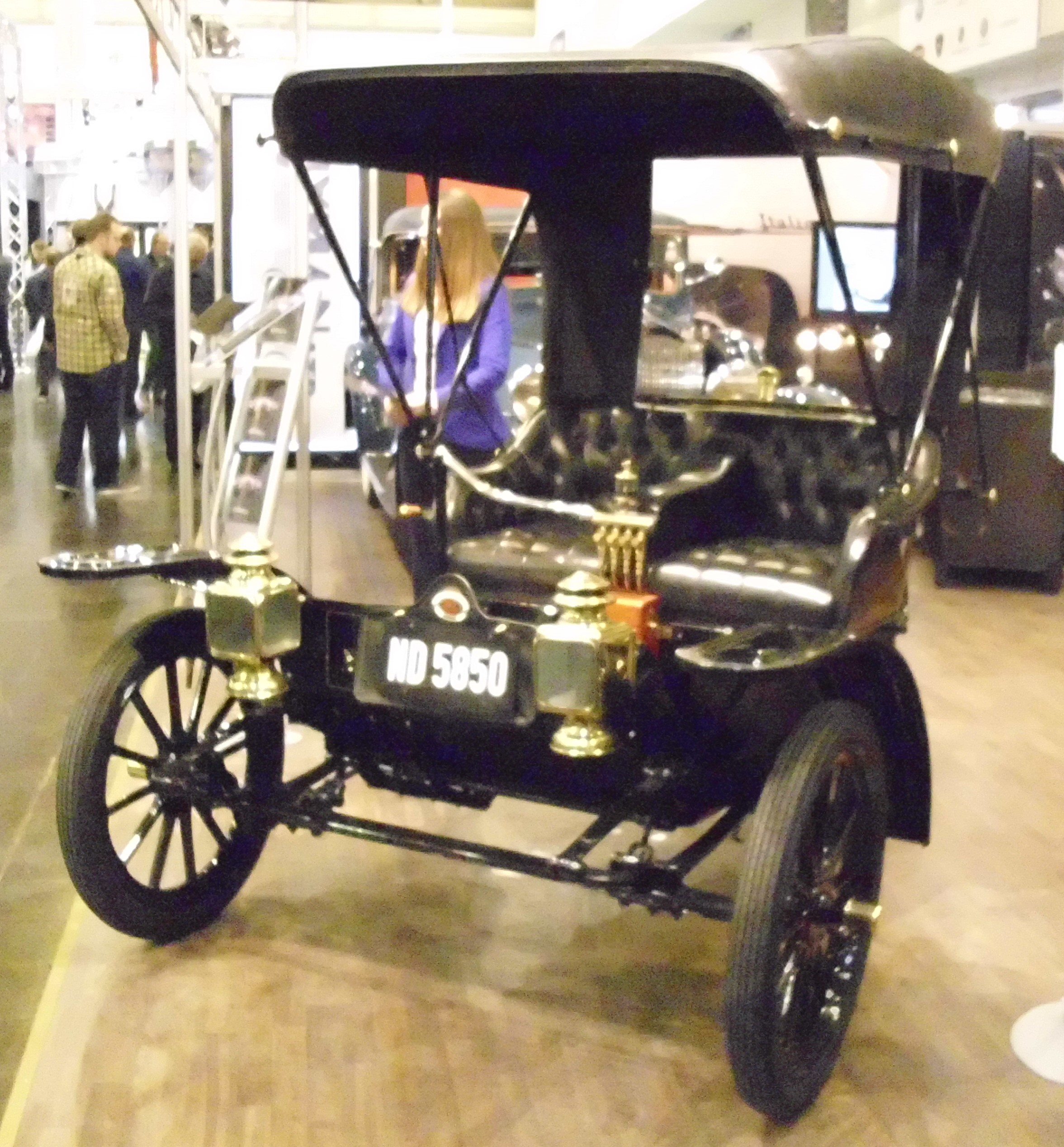 Motorette 10 HP 1911